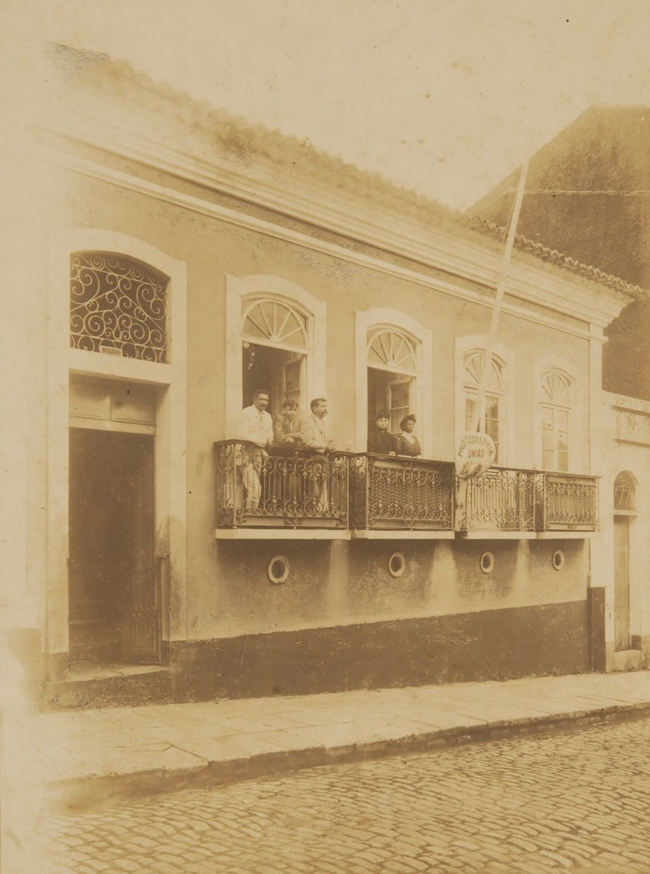 Edificio onde funciona a Photographia União